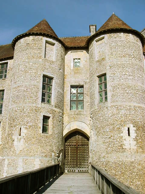 Le château d'Harcourt. Porte d'entrée principale au logis. Auteur : Osbern Date : septembre 2006